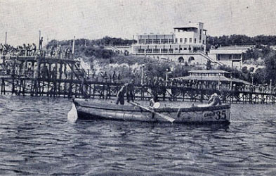 Burgas, Bulgarien: Blick auf die Seebrücke und Casino